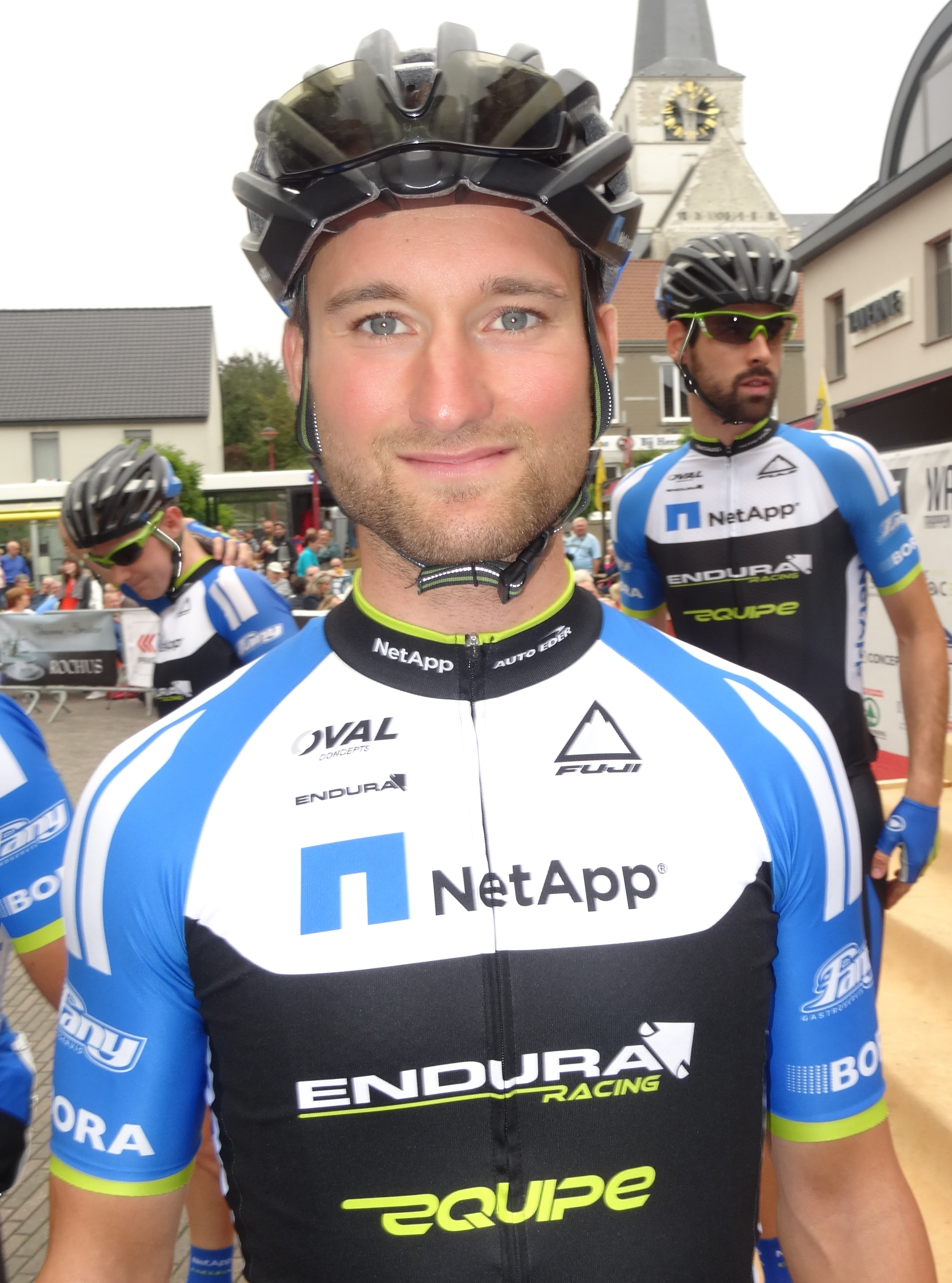 Reportage photographique réalisé le mercredi 27 août à l'occasion du départ de la Druivenkoers Overijse 2014 à Huldenberg, Belgique.